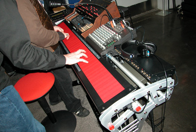 Es una imagen sacada desde un video de YouTube sobre el Continuum Fingerboard.